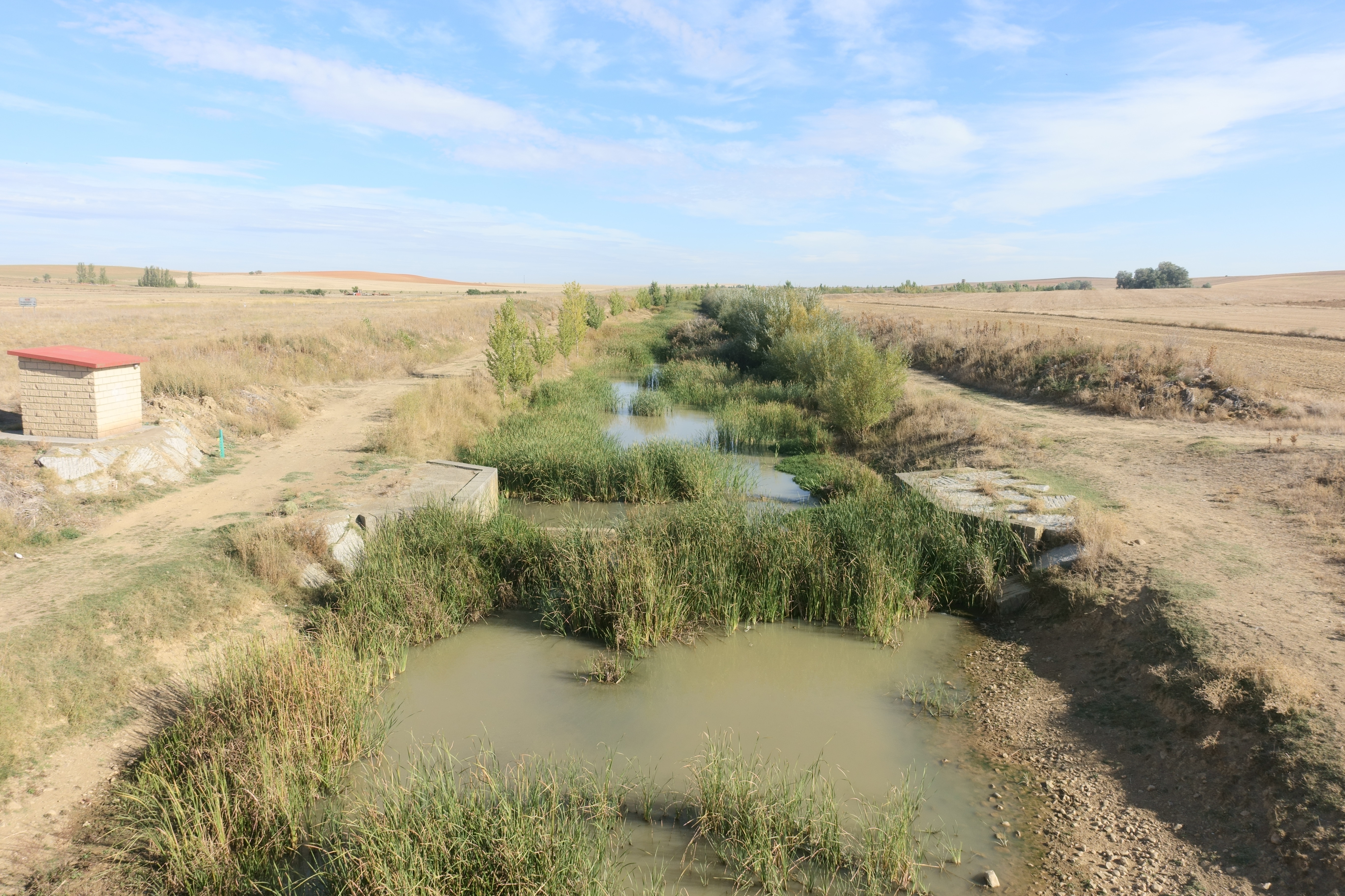 Río Valderaduey a su paso por Cañizo (Zamora, España).